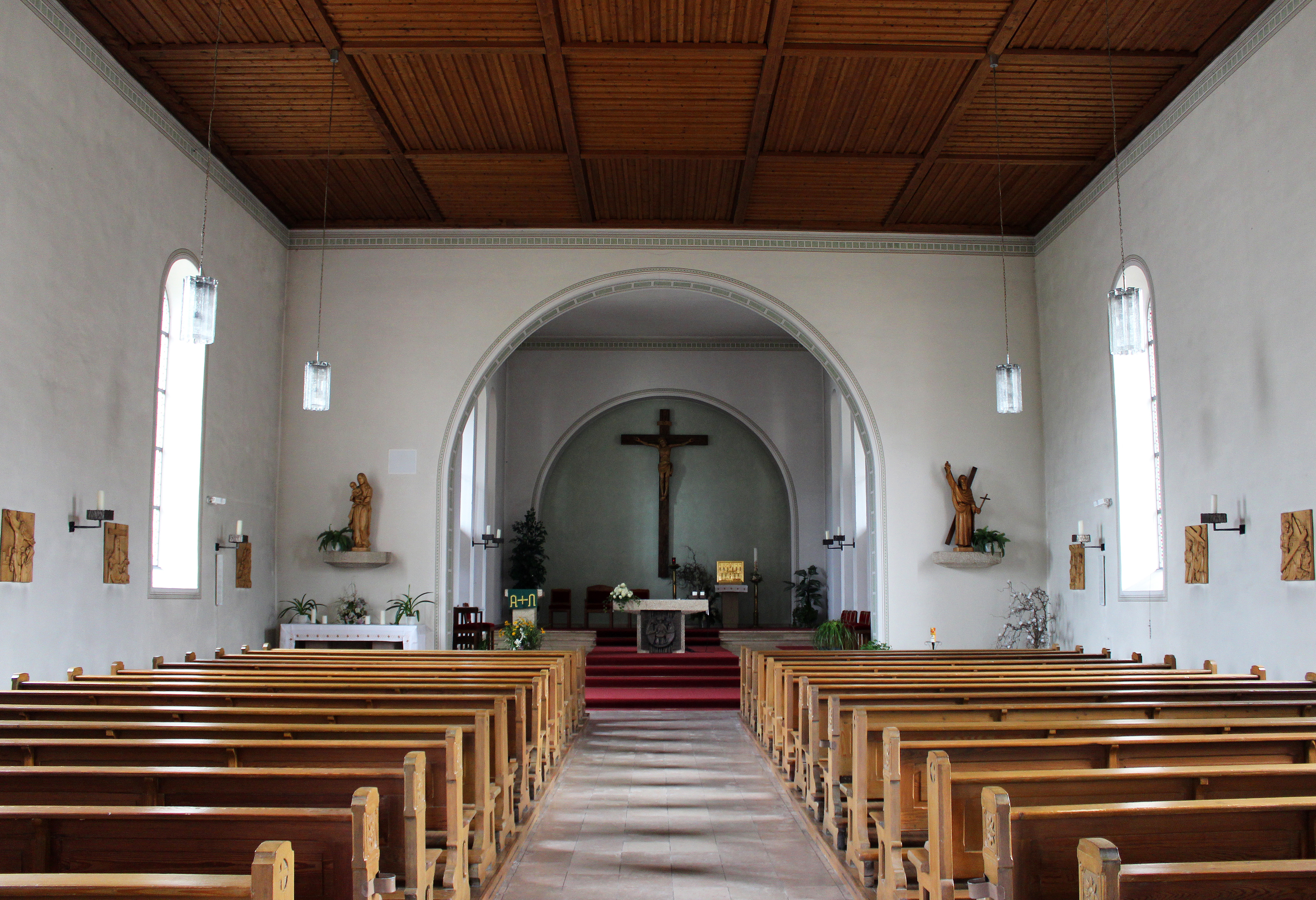 Blick ins Innere der katholischen Pfarrkirche St. Andreas in Altheim, einem Stadtteil von Blieskastel, Saarpfalz-Kreis, Saarland